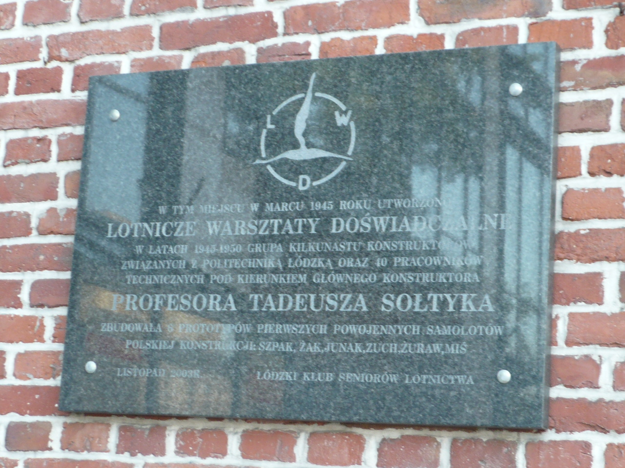 Łódź, ul. S. Kopcińskiego 56. Tablica pamiątkowa w miejscu funkcjonowania w latach 1945-1950 Lotniczych Warsztatów Doświadczalnych pod kierownictwem inż. Tadeusza Sołtyka.